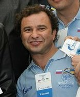 Виктор Павлик перед стартом очередного этапа международного автопробега Санкт-Петербург – Киев.